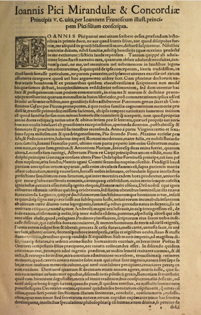 Scan 9 mit Vignette, Abhandlung über diverse philosophische und theologische Themen auf insgesamt 960 Seiten